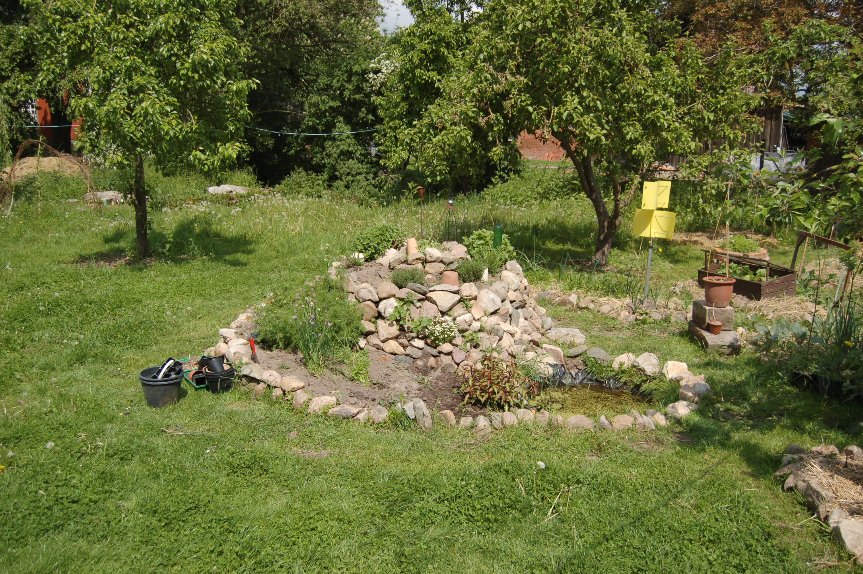 Kräuterspirale, Kräuterschnecke aus Feldsteinen Bereits im ersten Jahr haben sich dort Frösche angesiedelt.